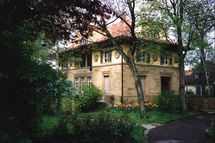 DFI-Villa in Ludwigsburg im Frühling (c) Deutsch-Französisches Institut / Ludwigsburg e.V. 2006